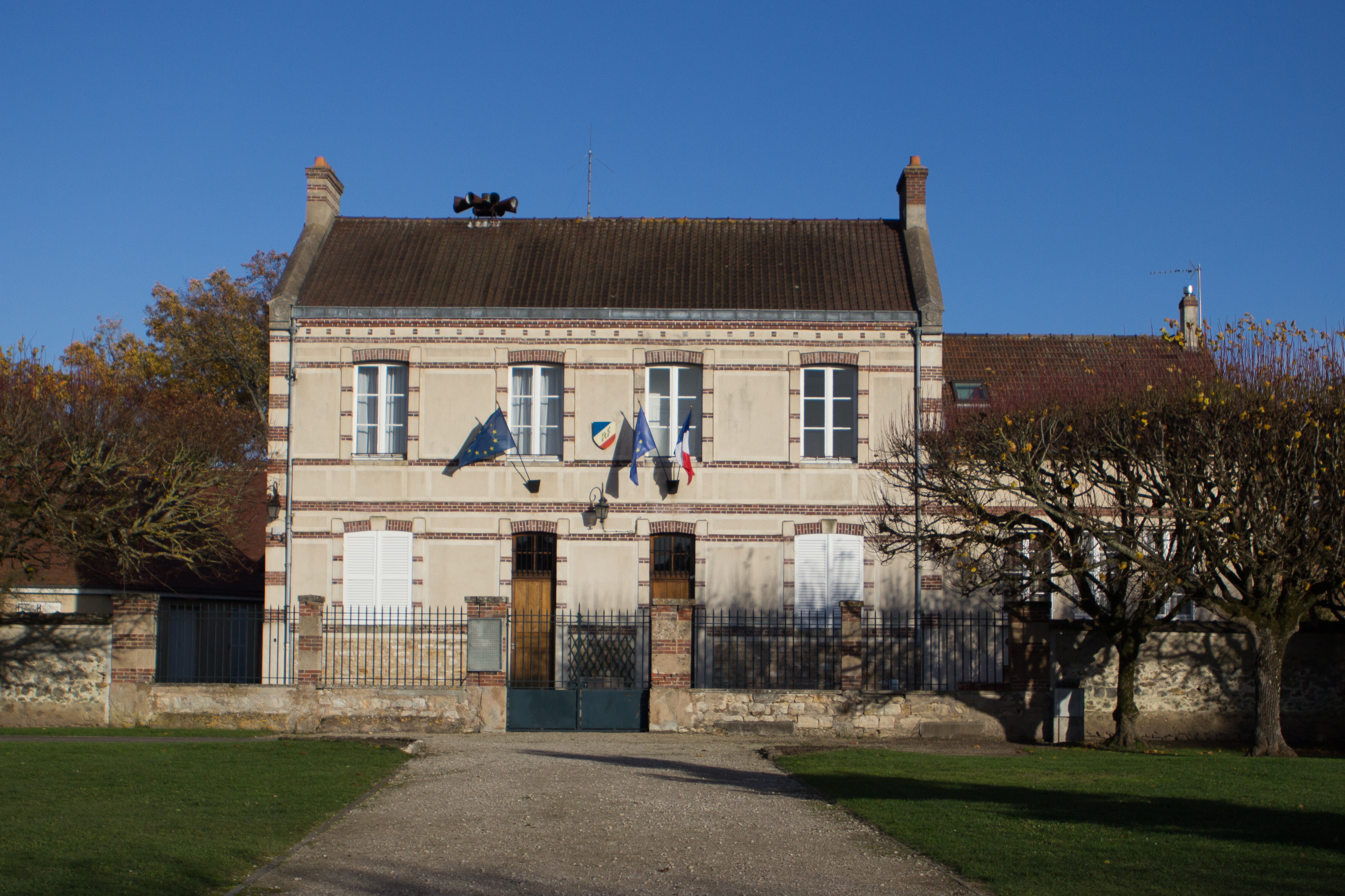 Mairie de Perthes-en-Gatinais, Seine-et-Marne, France.